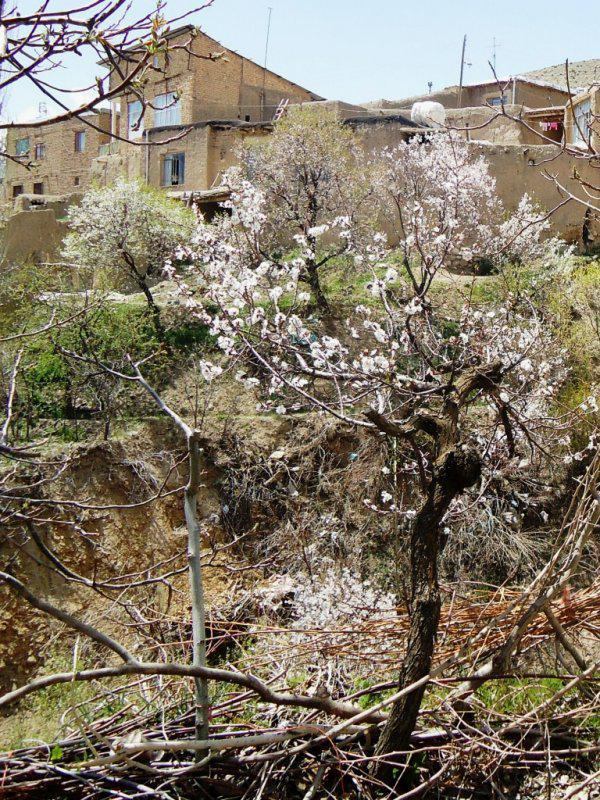 تصویری از روستای زیبای تجره و شکوفه های درختان در فصل بهار